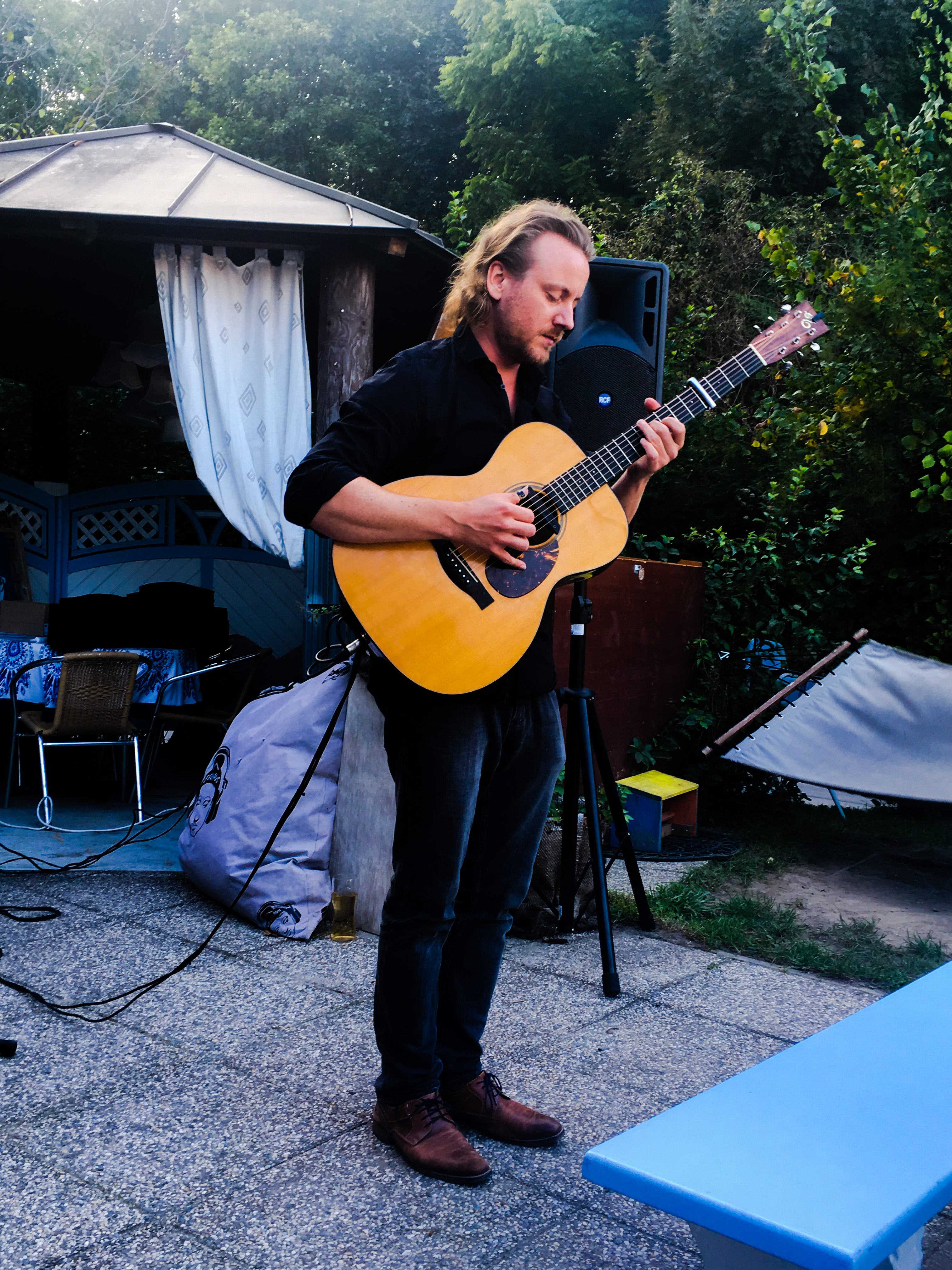 Markus Schlesinger - Concert in Vienna 2018